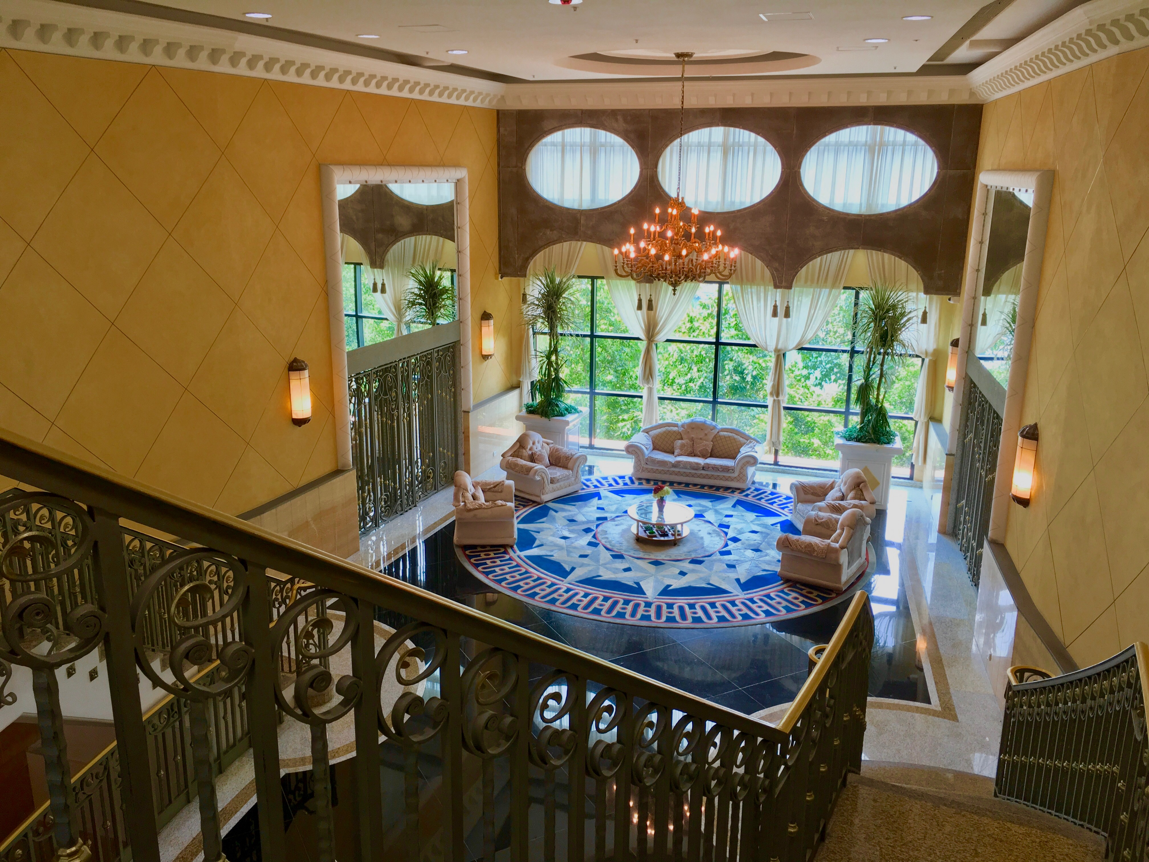 中文（香港）: 清水灣半島會所休憩雅座